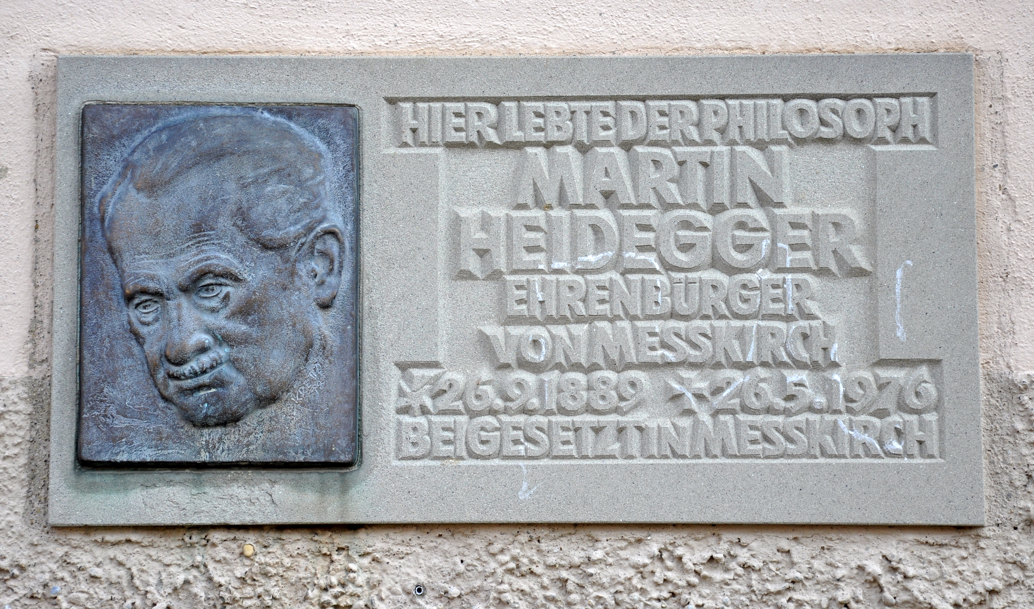 Meßkirch, Heideggerhaus, Gedenktafel